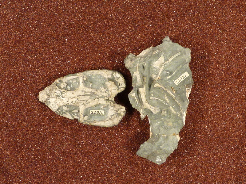 Emydops sp